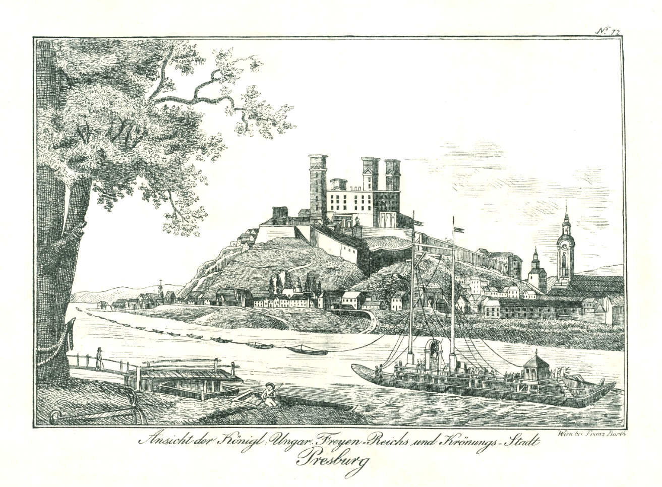 Ansicht der Königl. Ungar. Freyen Reichs und Krönungs Stadt Presburg